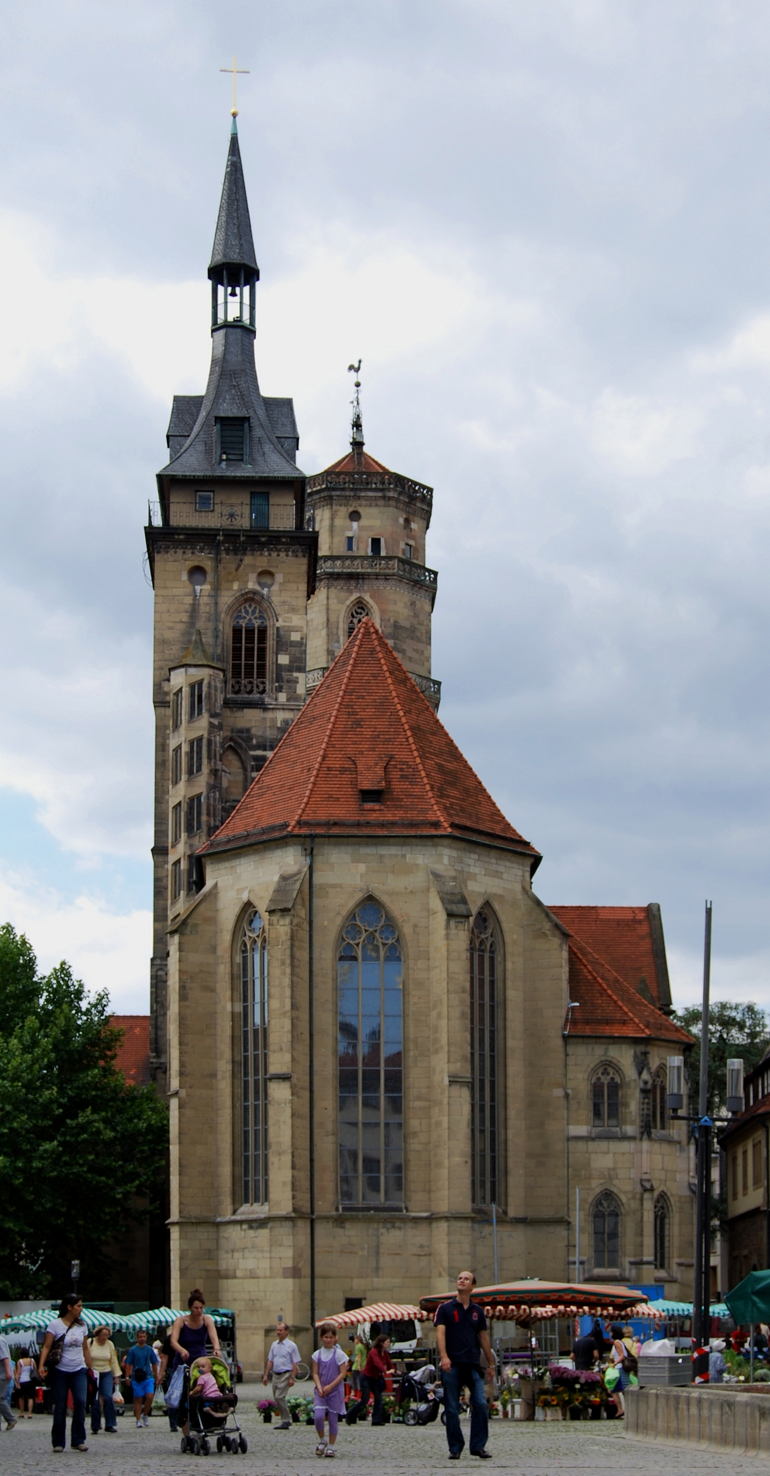 Die Stiftskirche in Stuttgart im August 2010, Perspektive korrigiert mit ShiftN.